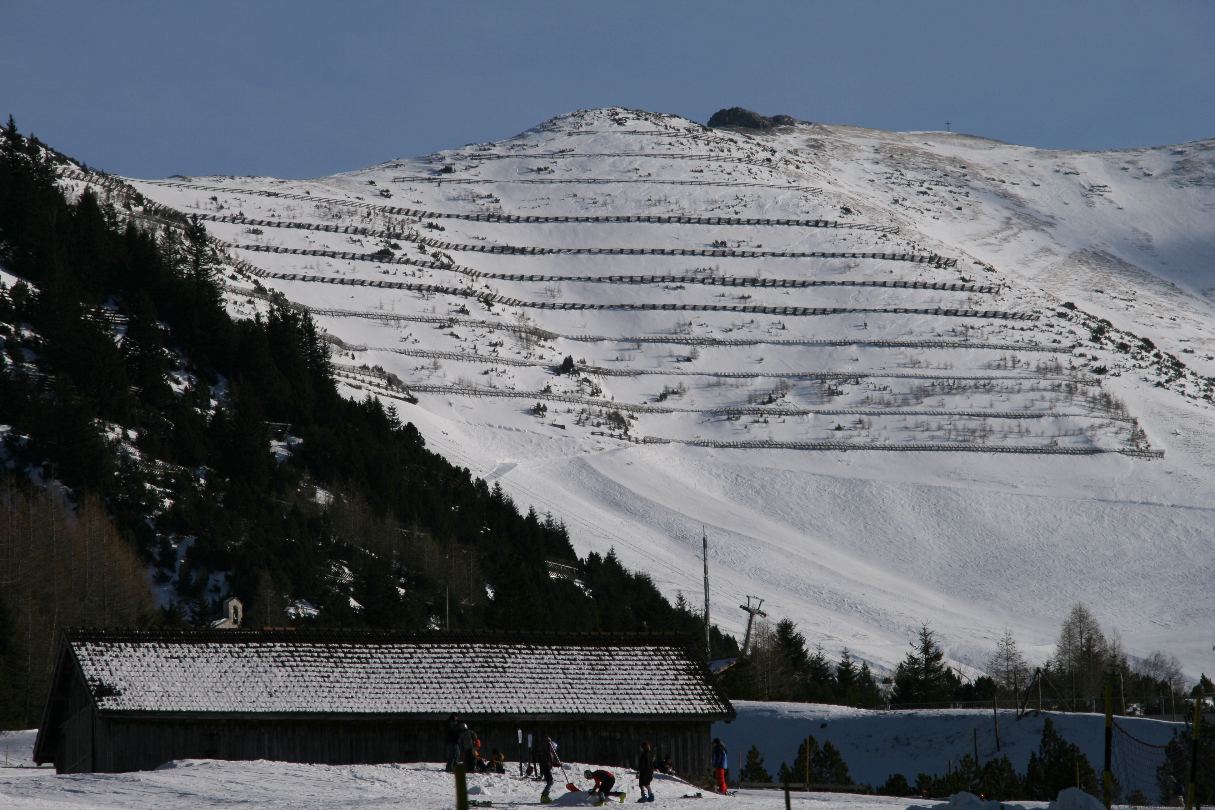 Winter in Malbun.